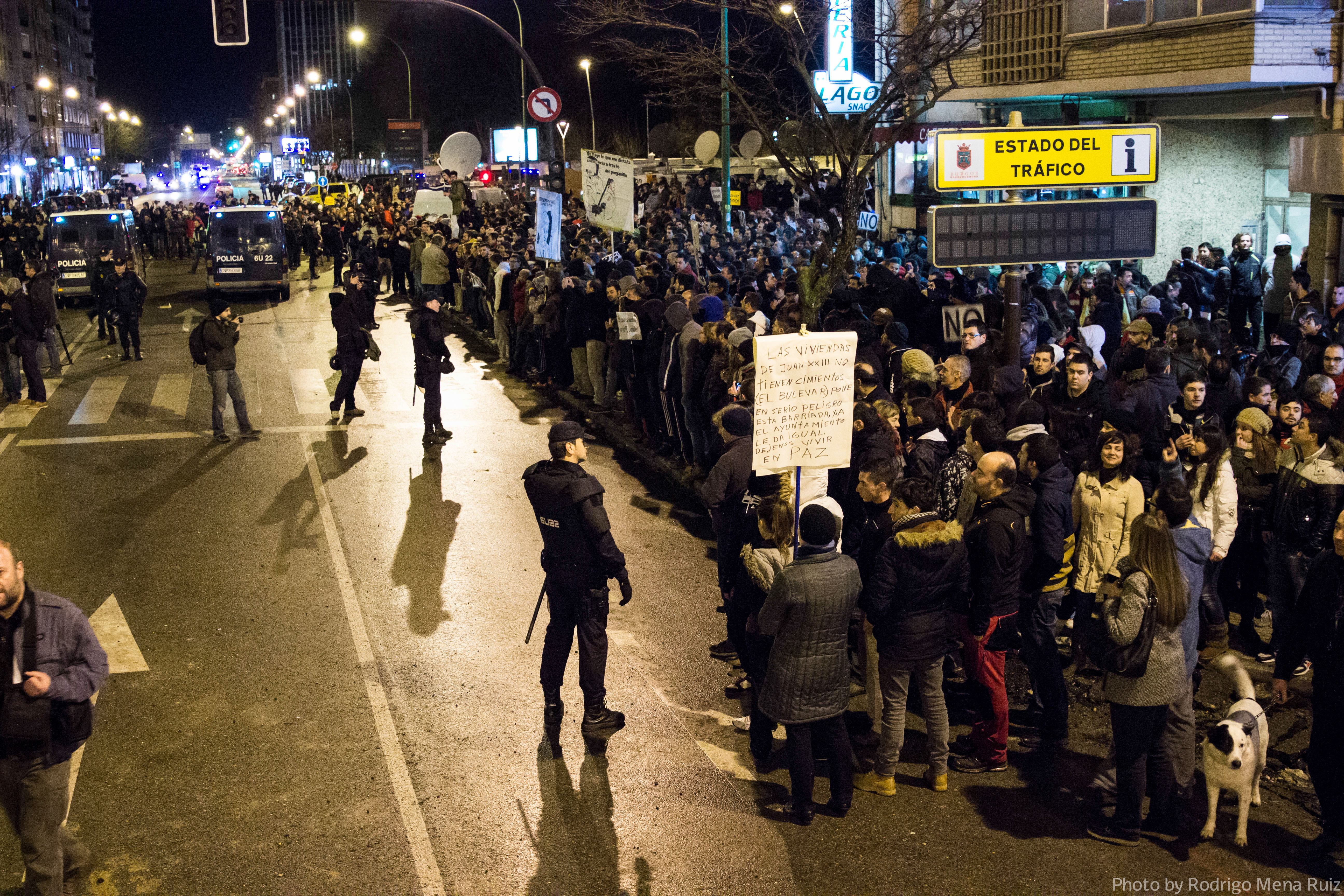 Obras Bulevar de Gamonal. 14 de enero 2014. Protestas en calle Vitoria.